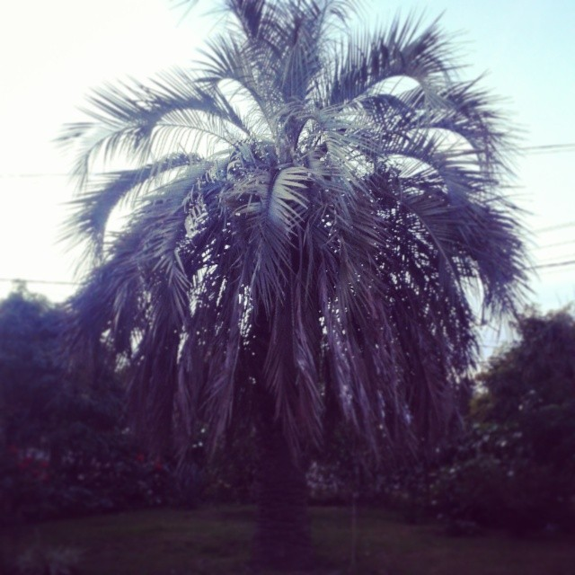 La palmera capitata (Butia capitata) es una especie del género Butia de la familia de las palmeras (Arecaceae). Habita en el nordeste de Sudamérica